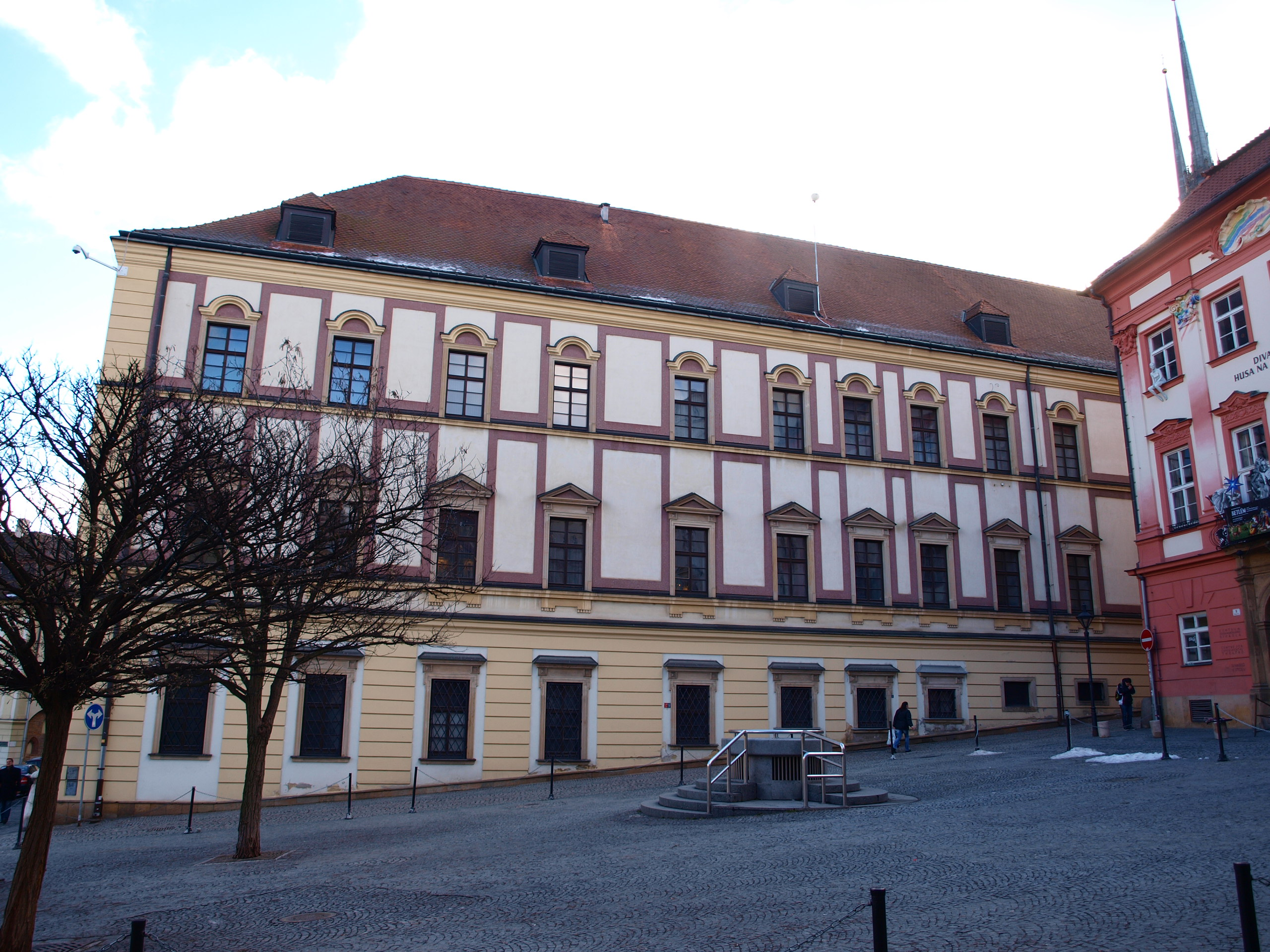 Dietrichsteinský palác, Brno